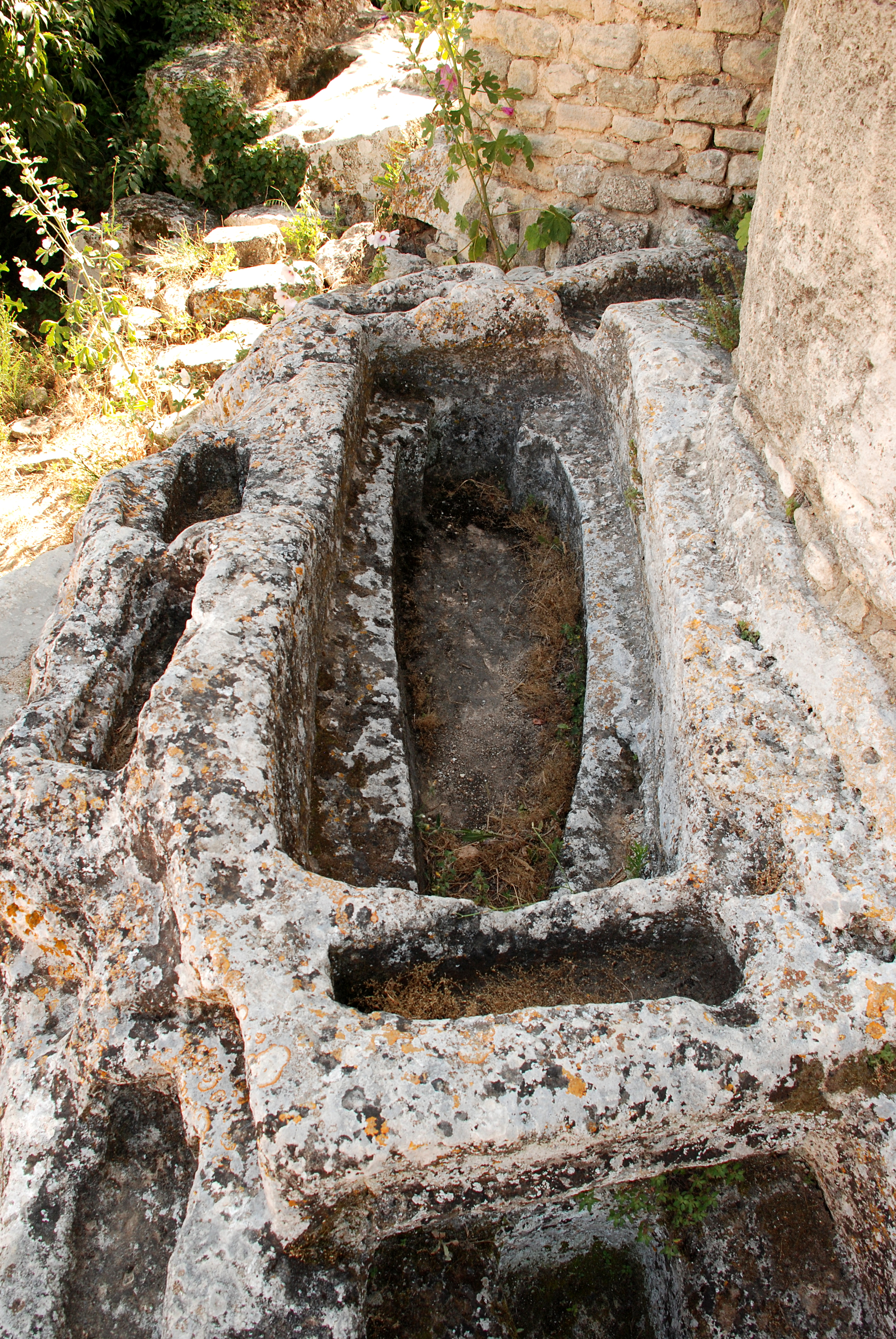 France - Provence - Vaucluse - Luberon - Église de Saint-Pantaléon